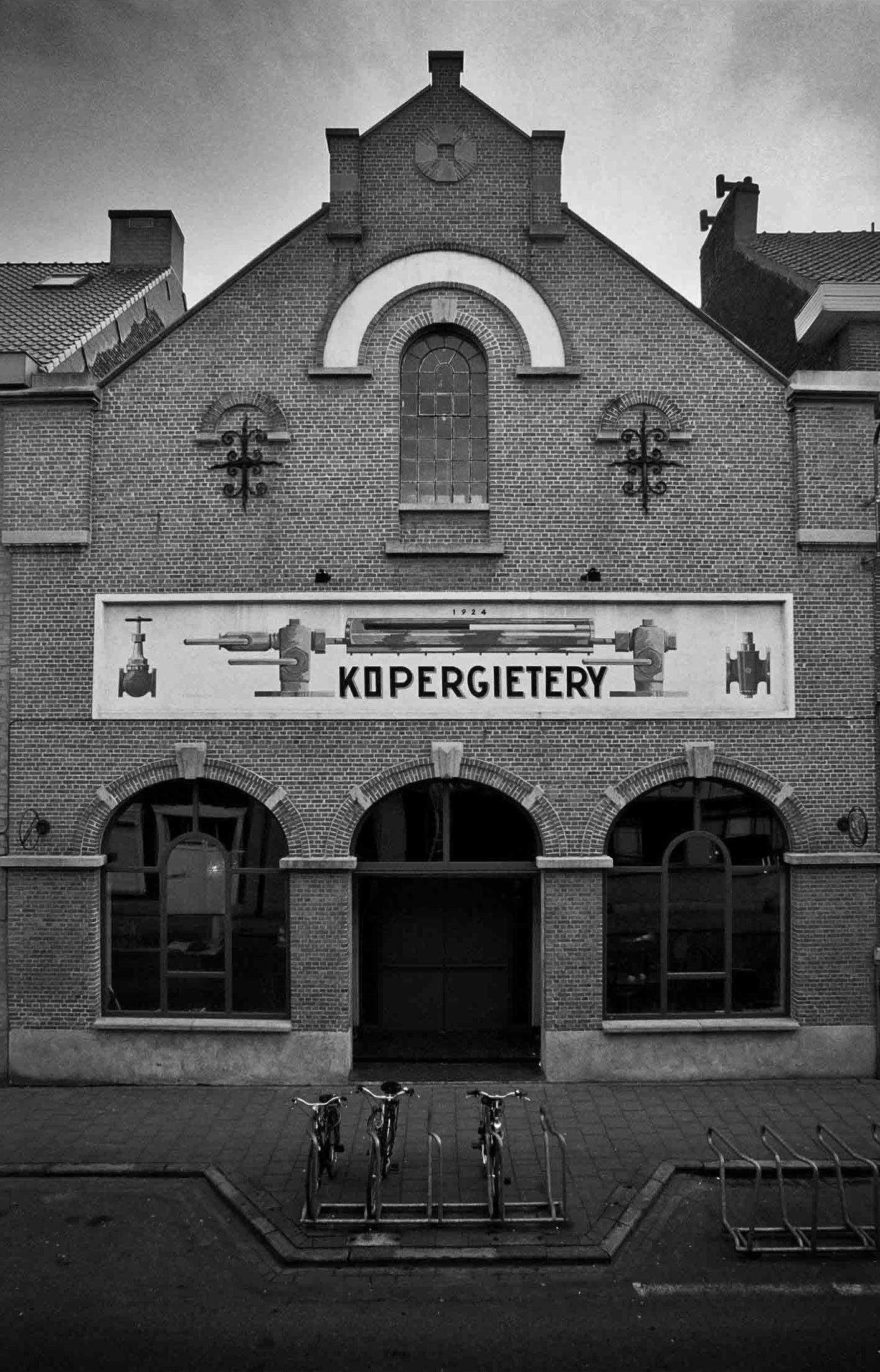 KOPERGIETERY (c) Phile Deprez